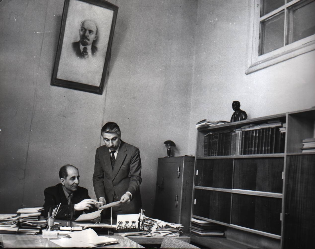 Kurdî: Emerîkê Serdar û Mîroyê Esed s.1980-î